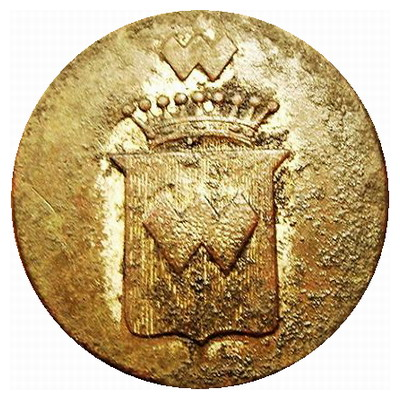 Guzik herbowy Abdank